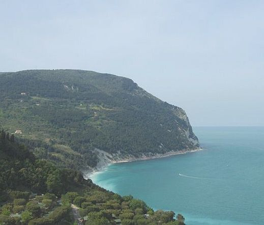 Sirolo, Marche, Italia